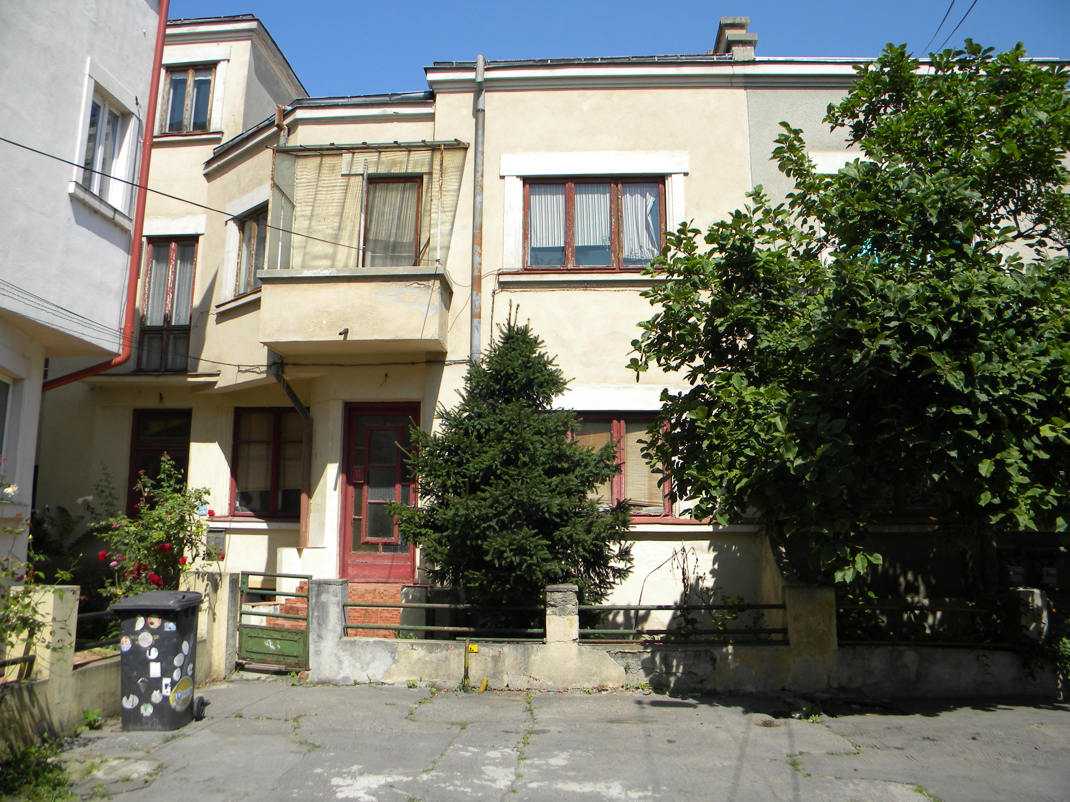 Bucuresti, Romania, Imobilul nr. 13 de pe Str. Naum Ramniceanu; B-II-m-B-19532